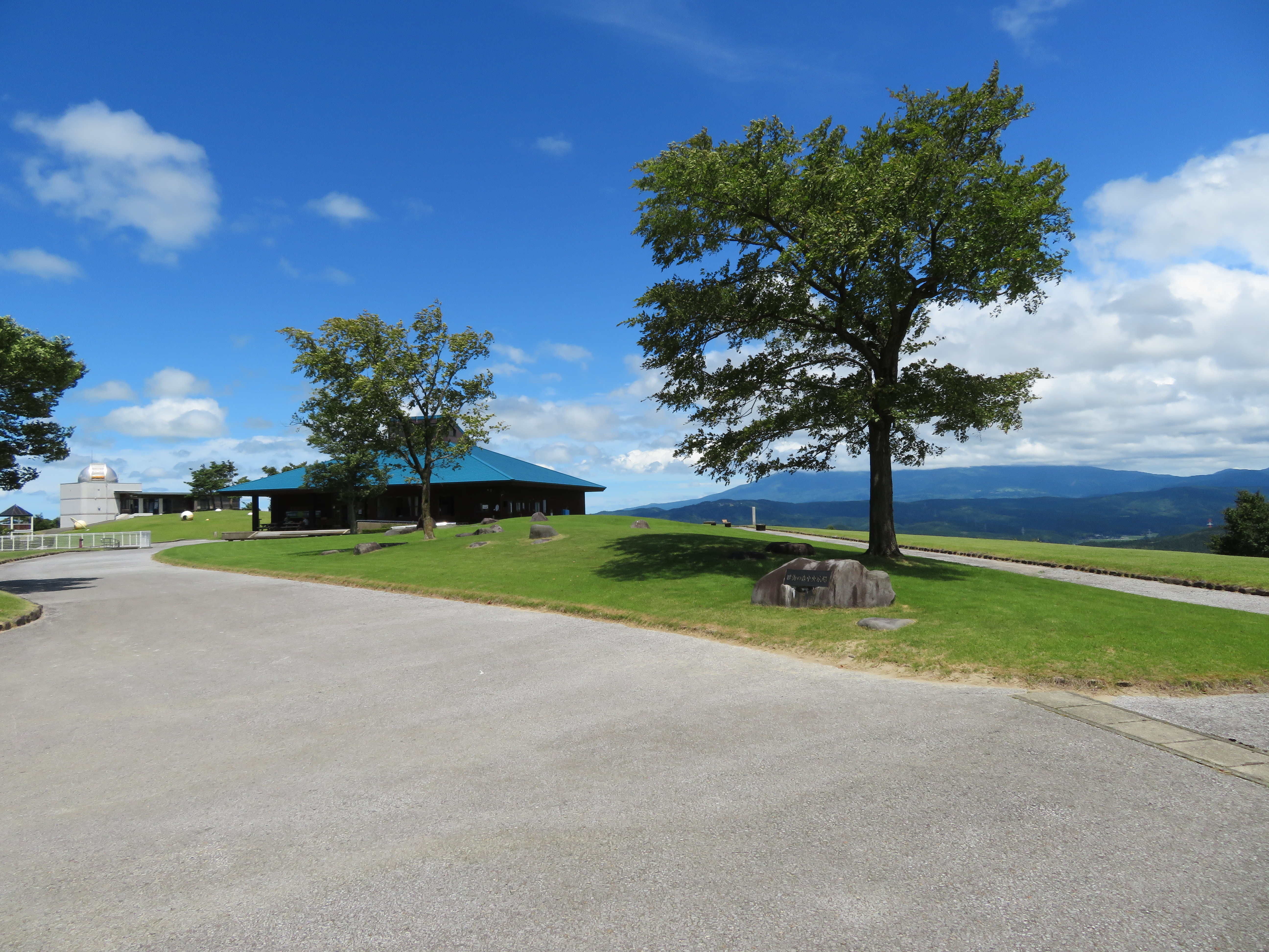 山形県酒田市にある眺海の森中央広場 Canon PowerShot SX720 HS